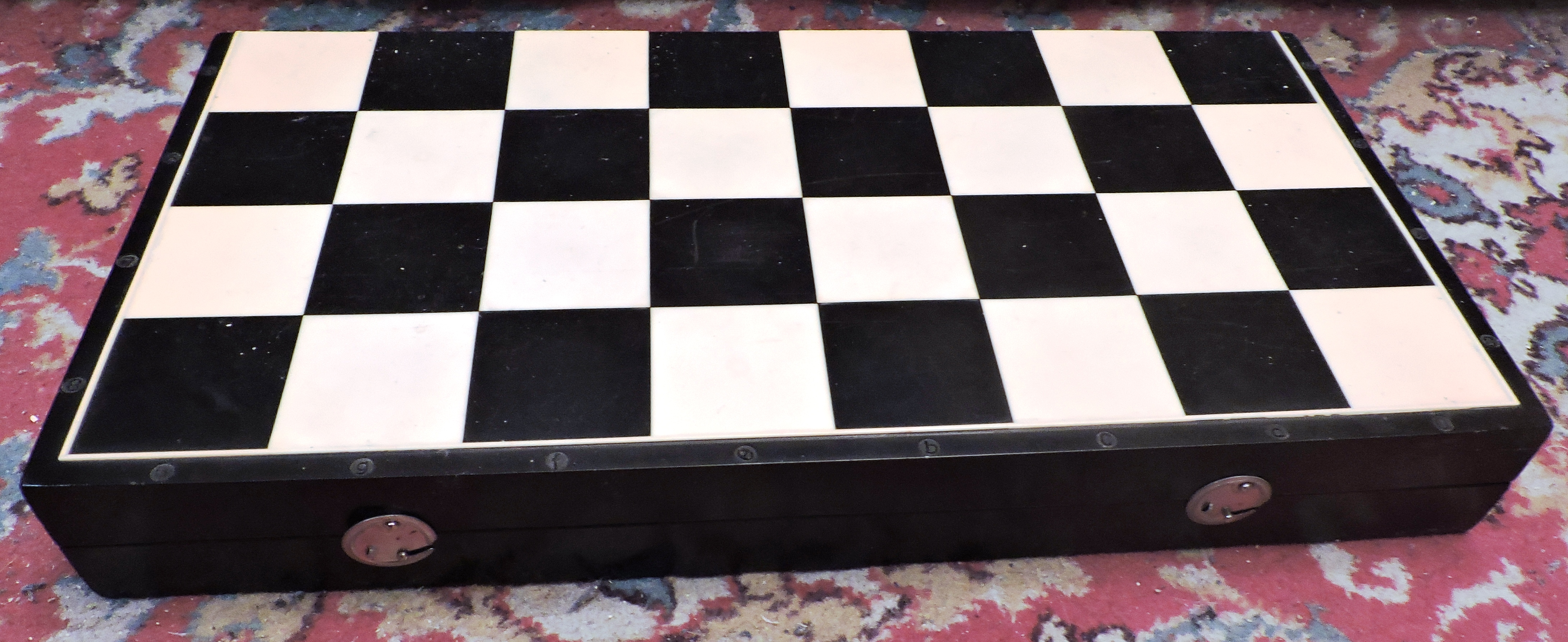 Шахматная доска в сложенном виде